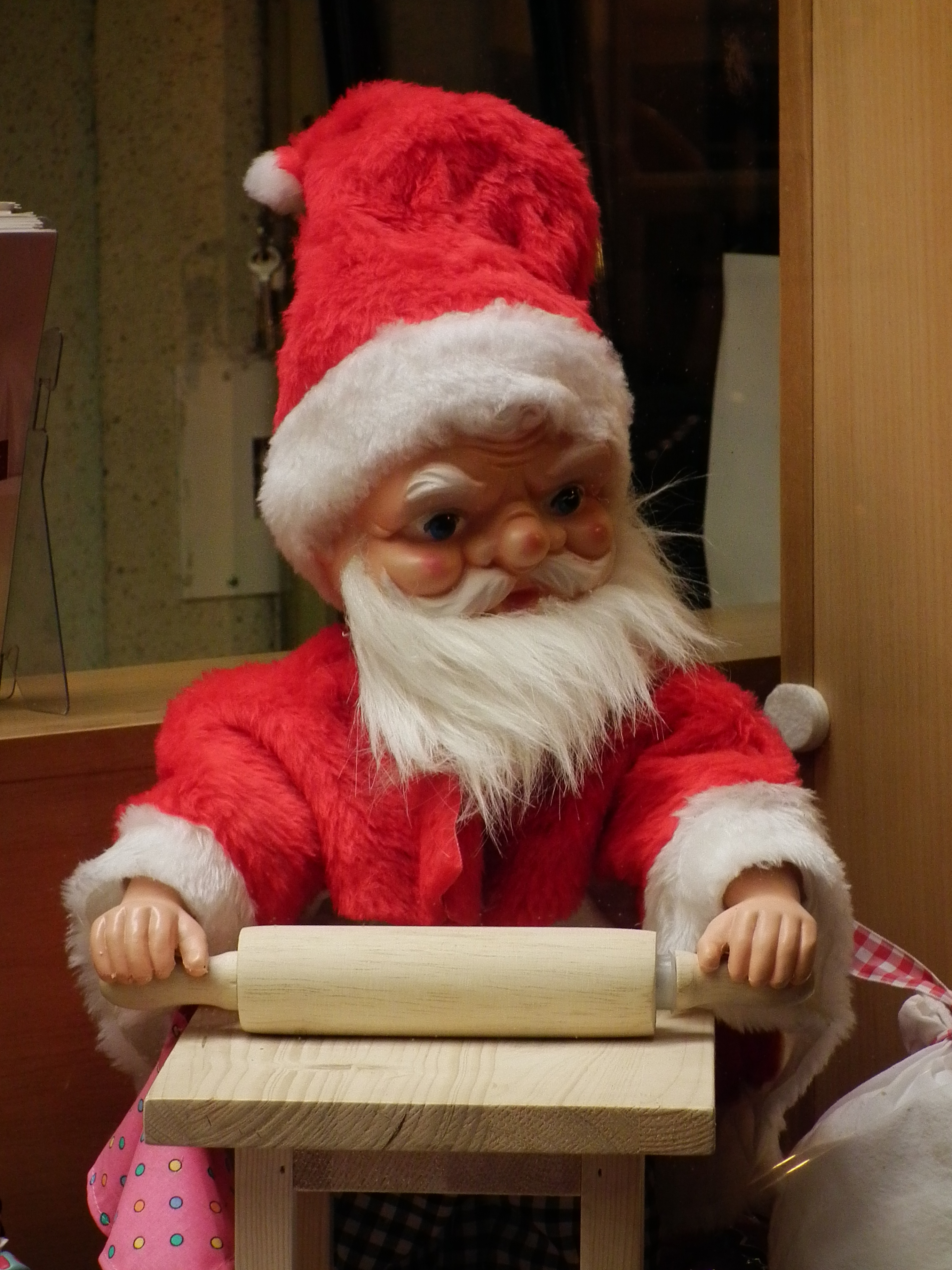 Bewegliche Weihnachtsmannfigur mit Nudelholz